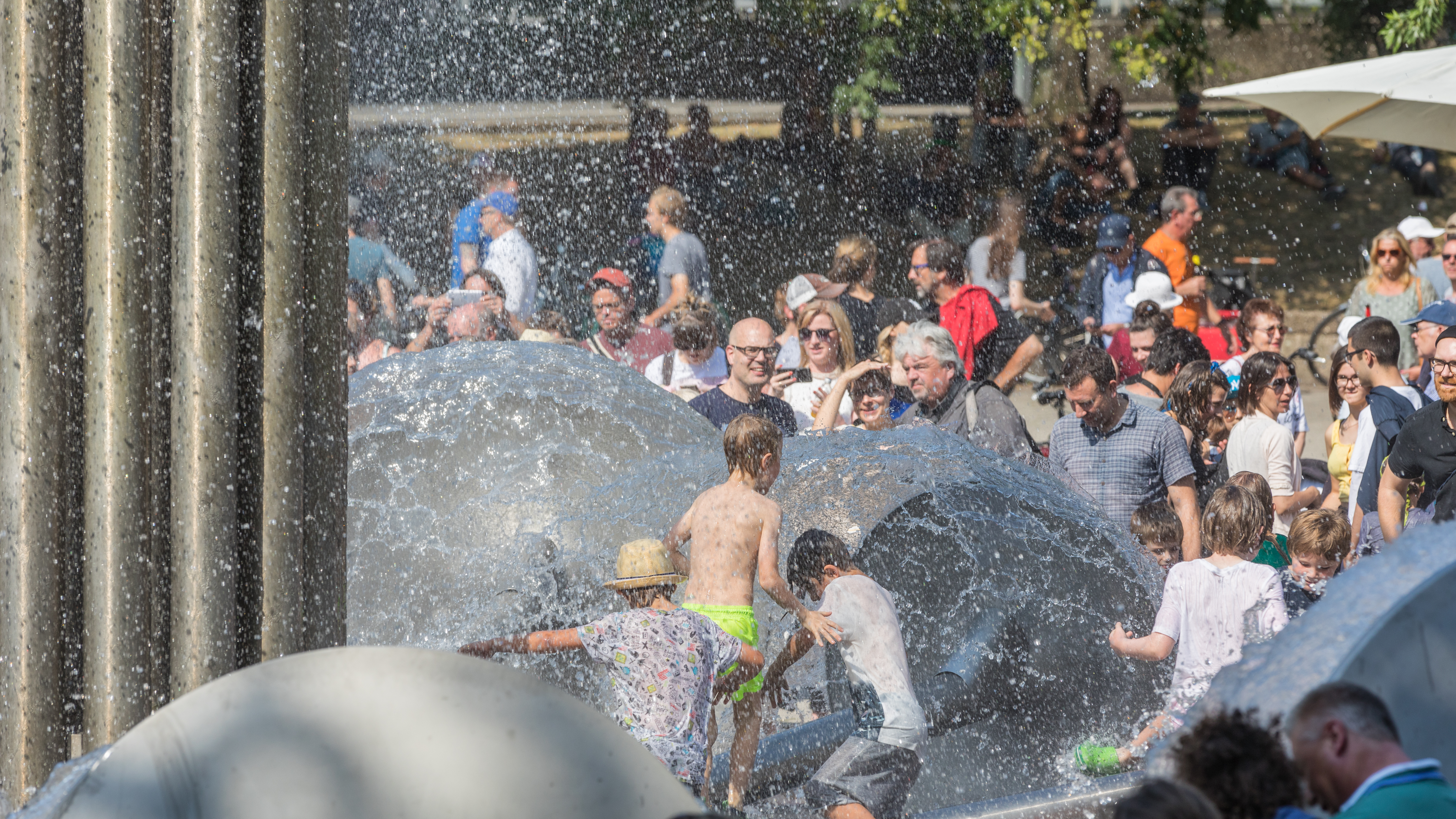 Inbetriebnahme „Wasserkinetische Plastik“ Ebertplatz, Köln